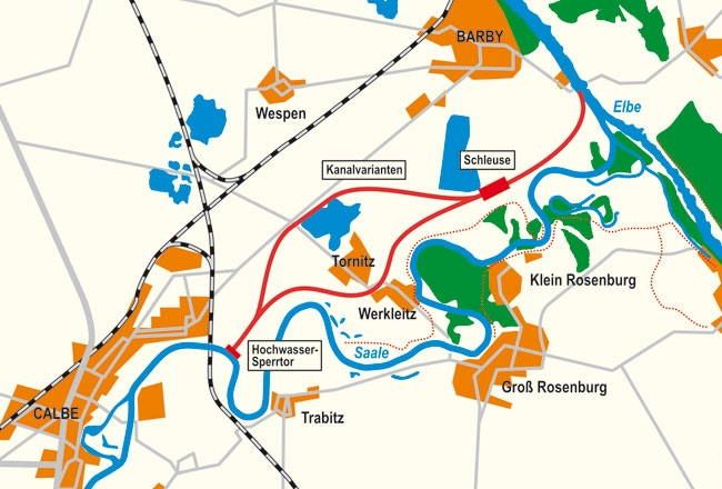 Skizze des geplanten Elbe-Saale Kanals bei Tornitz